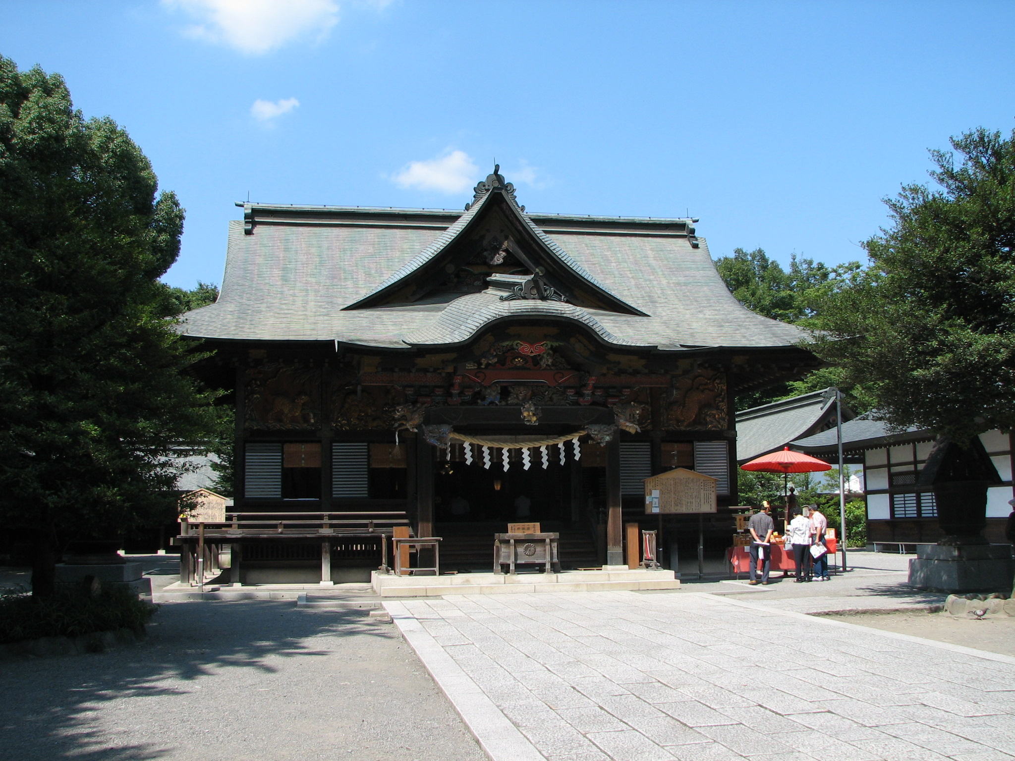 the Haiden of Chichibu-jinja, Chichibu, Saitama, Japan 秩父神社拝殿（埼玉県秩父市）